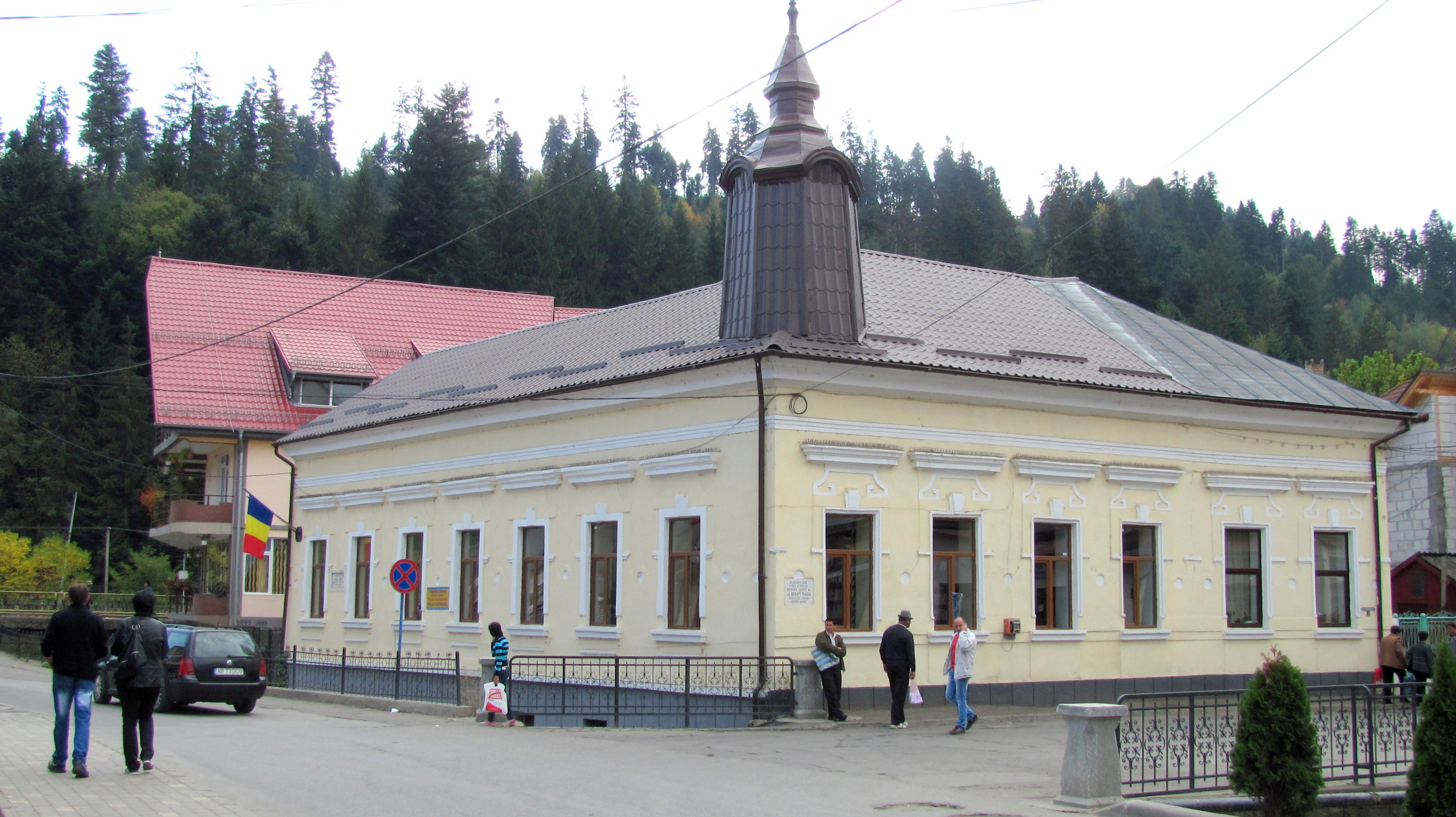 Câmpeni, Alba - Muzeul "Avram Iancu" - (Str. Revoluţiei 1848, nr.1)